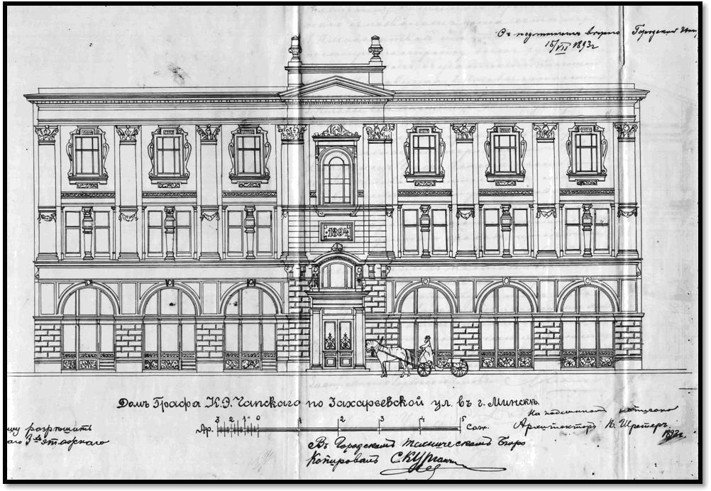 Беларуская (тарашкевіца): Менск (Miensk), вуліца Захараўская (vulica Zacharaŭskaja). Праект палаца Чапскага (Čapski)